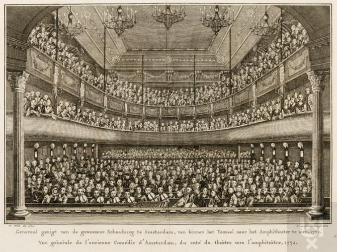 Interieur Schouwbrug Vingboons